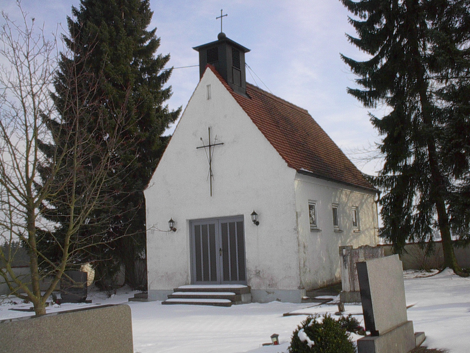 Das Illdorfer Leichenhaus auf dem Friedhof.